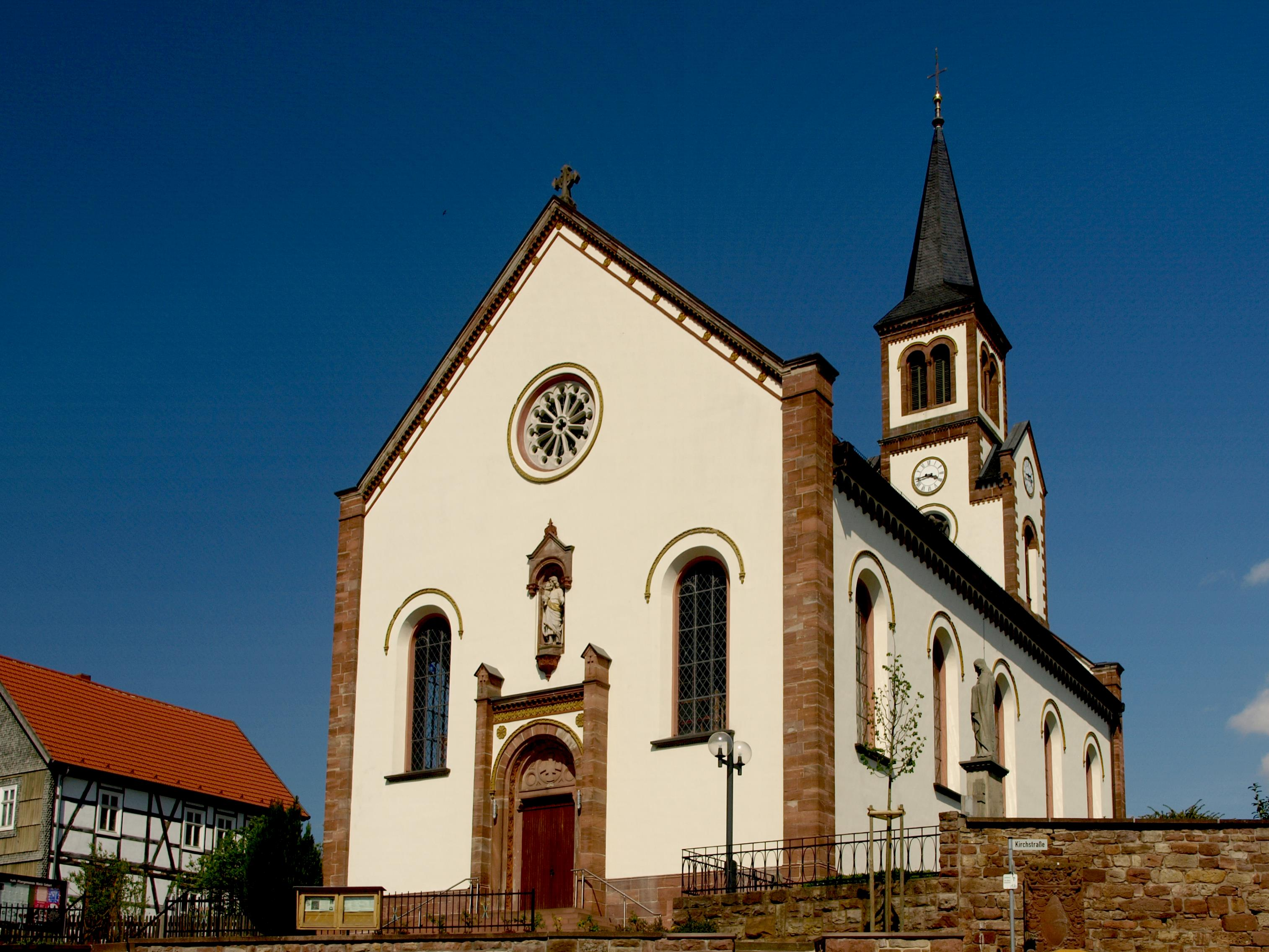 Katholische Kirche Mariae Geburt in Buttlar aus dem Jahr 1882